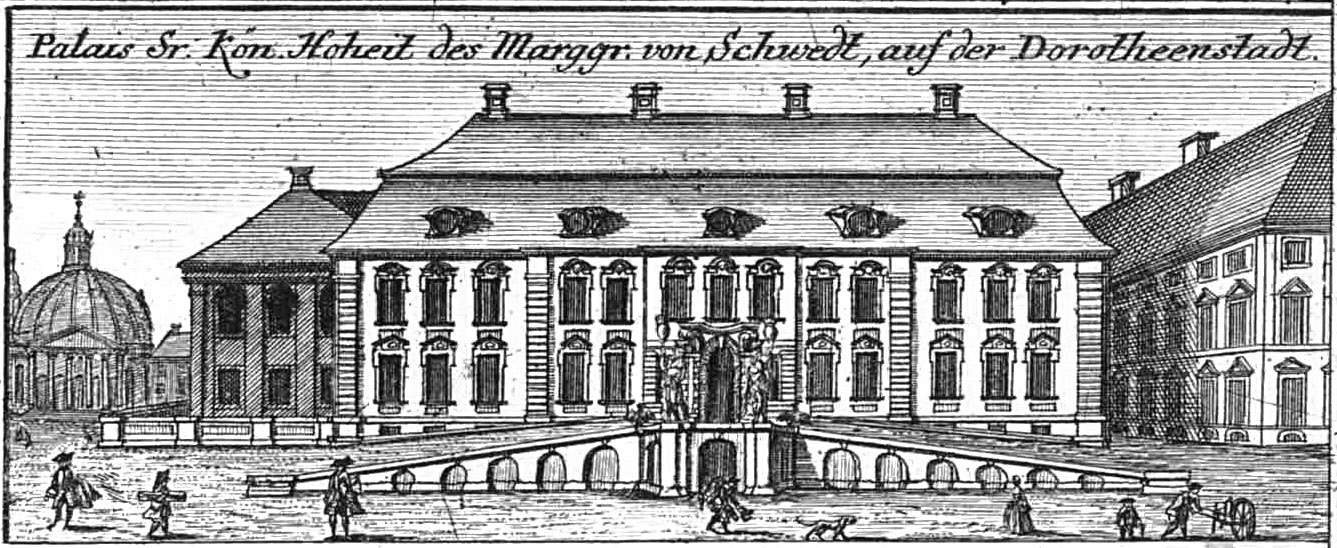 Aus Schleuens Berliner Plan von 1757 entnommen